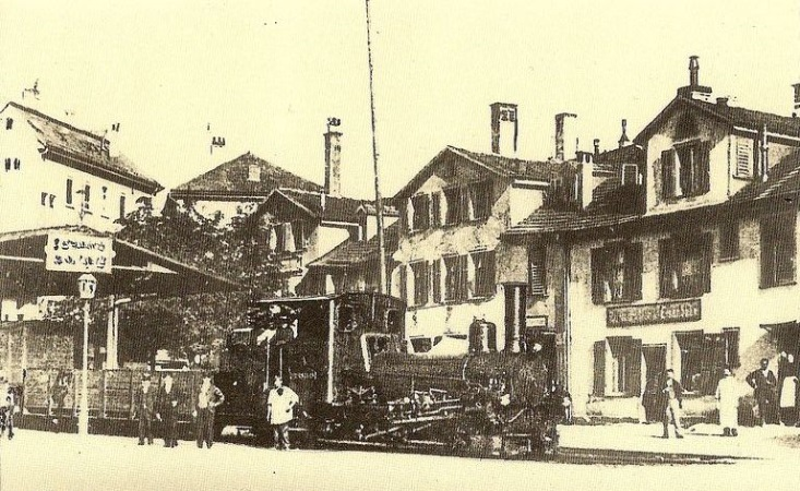 HG 2/3 Nr. 4 „St. Gallen“ der Appenzeller-Strassenbahn (ASt) auf der Poststrasse in St. Gallen. Die Billetausgabe erfolgte in der Wirtschaft „Zur Eisenbahn“